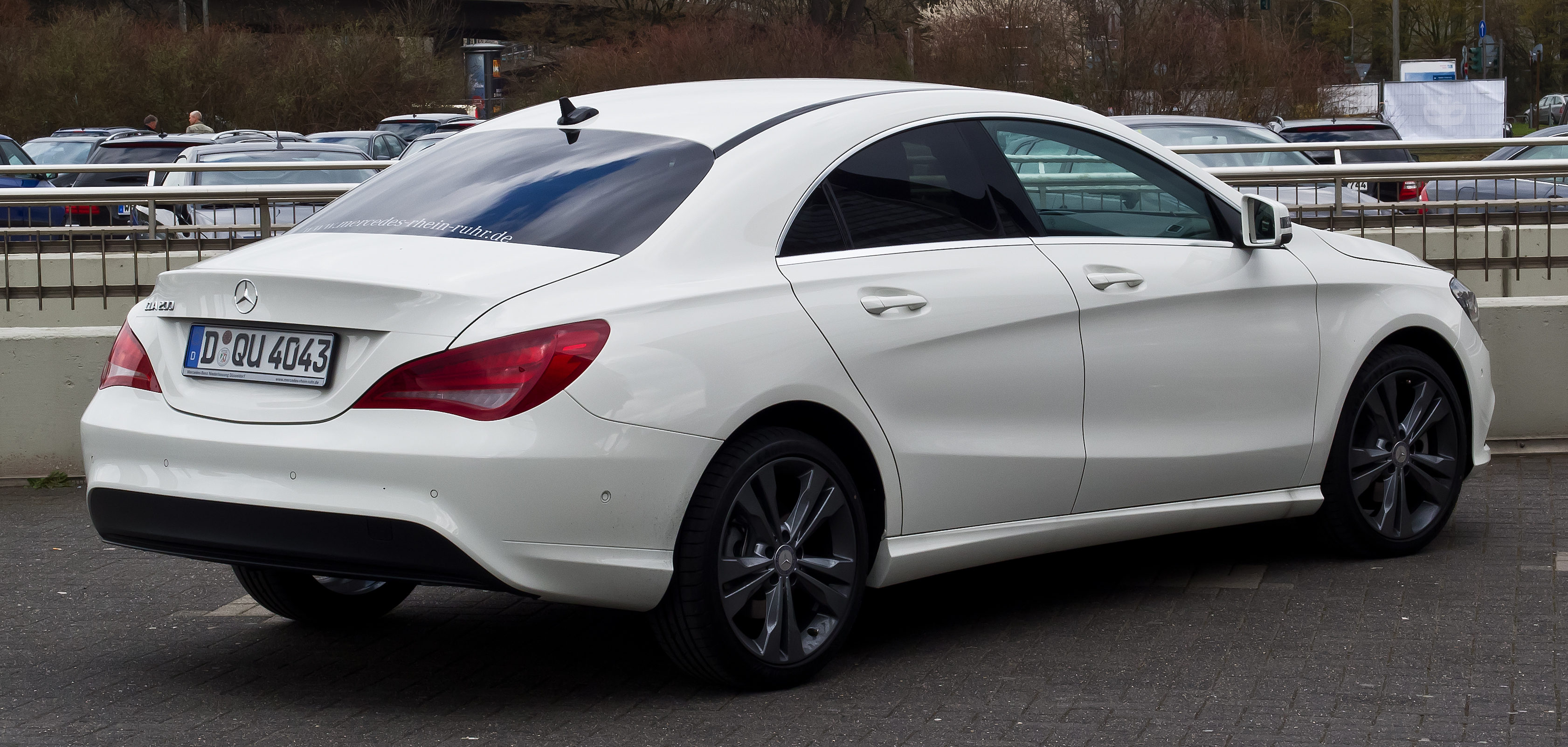 Mercedes-Benz CLA 200 (C 117)